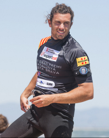 matteo iachino